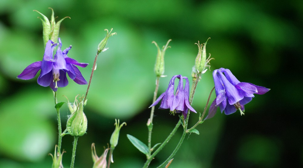 Gemeine oder Wald- Akelei (Aquilegia vulgaris)